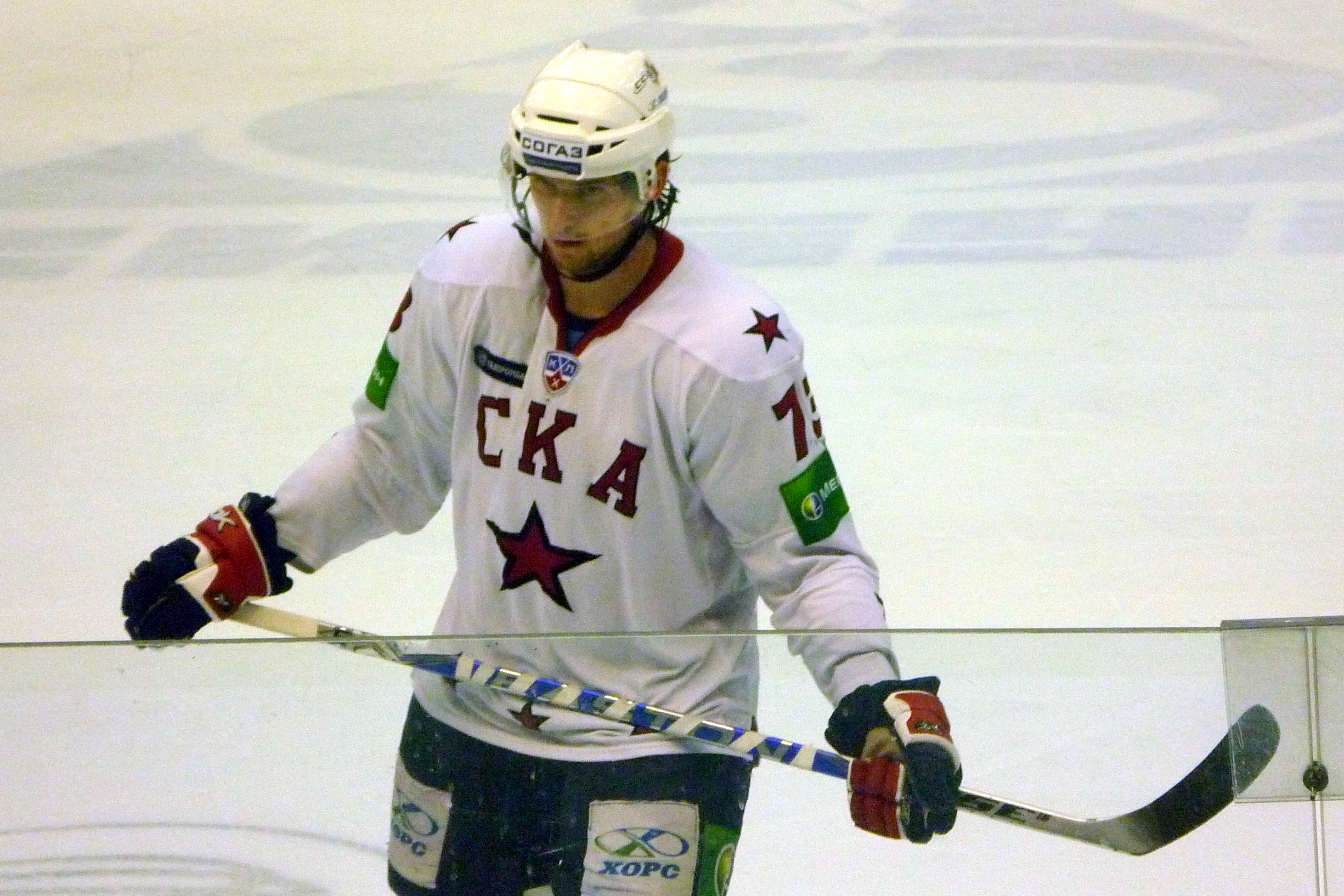 Защитник питерского СКА Денис Гребешков в матче против нижегородского «Торпедо» 12 декабря 2010